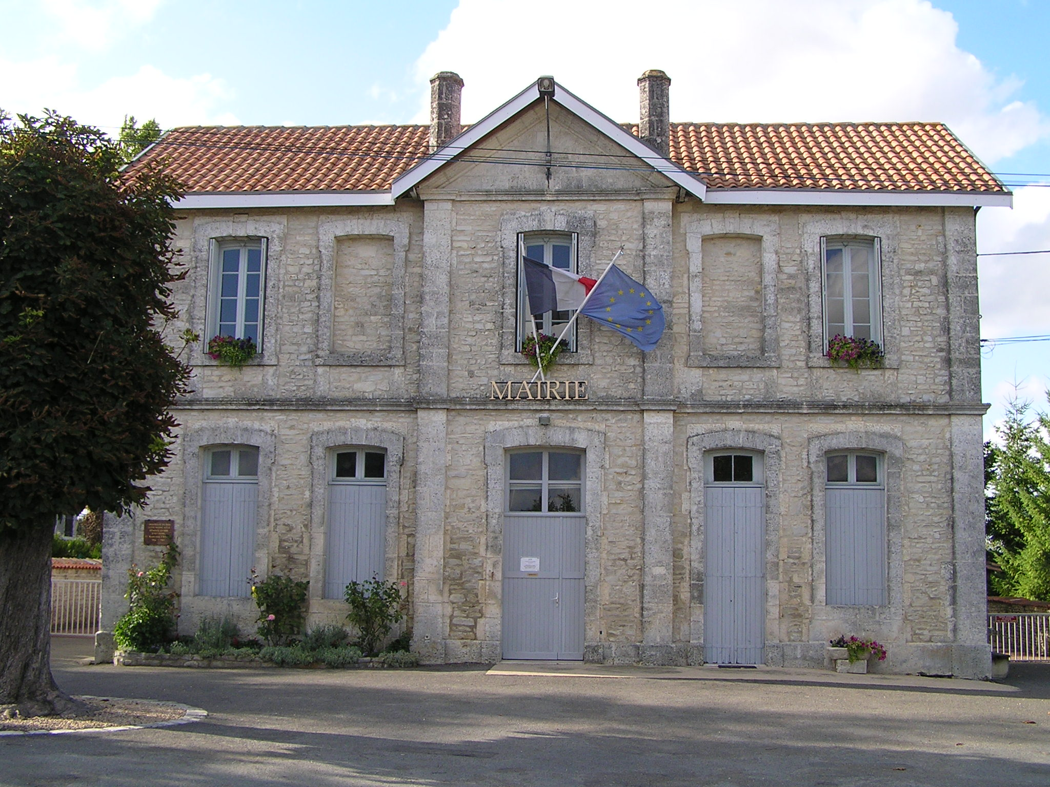 mairie d'Aussac-Vadalle à Vadalle